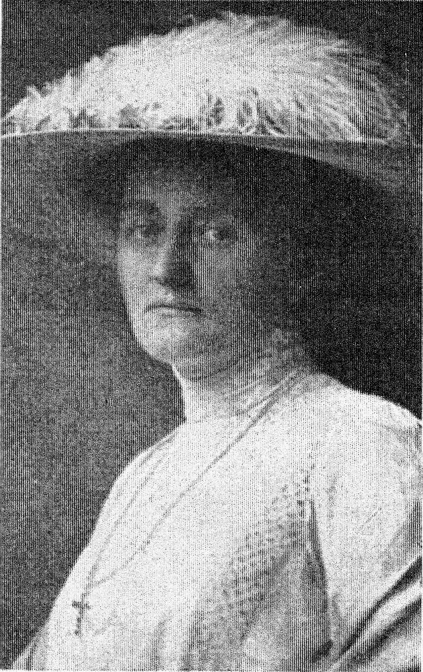 Emmy von Egidy (1872–1946), deutsche Schriftstellerin, Bildhauerin, Malerin